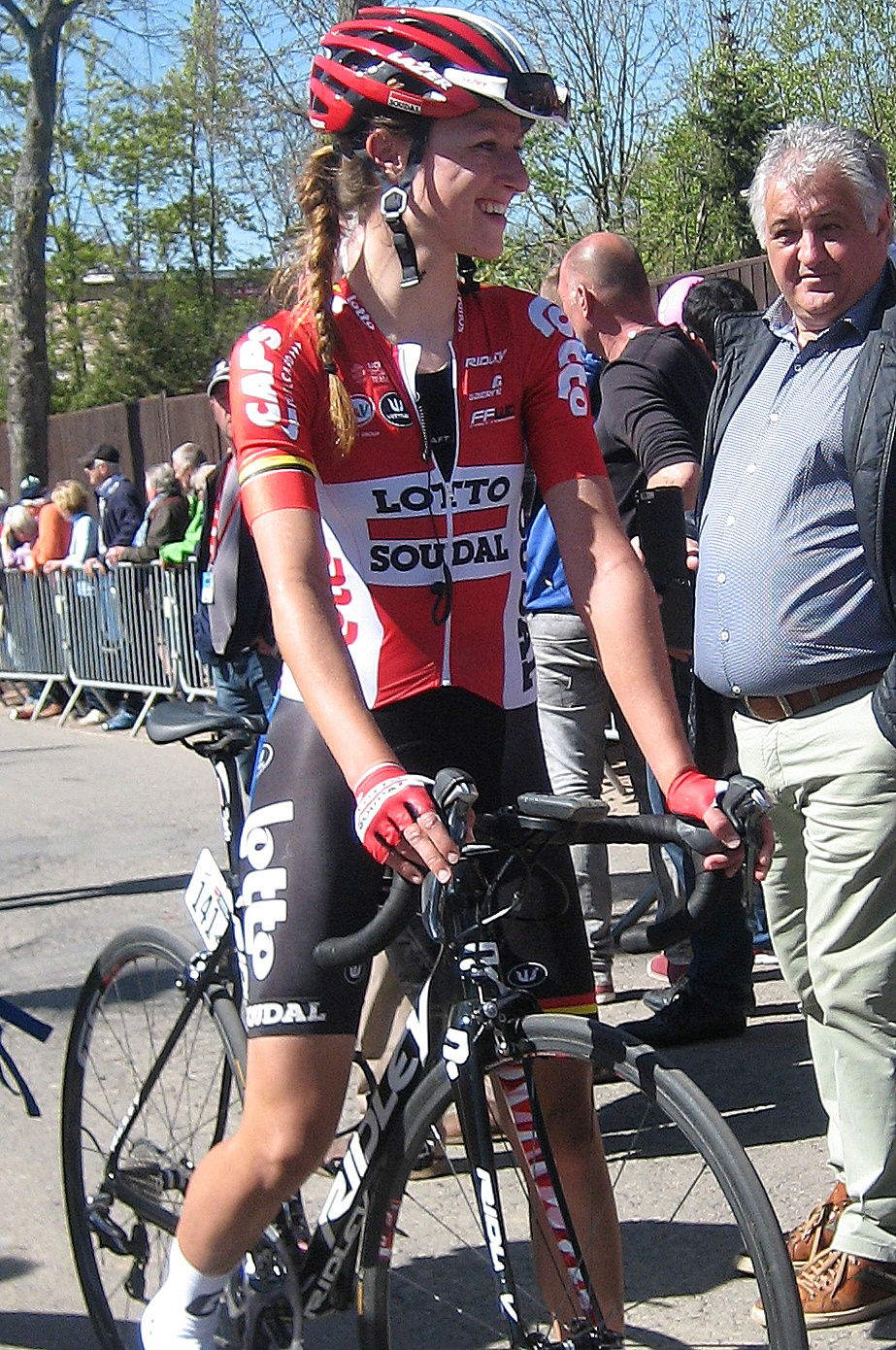 Jessie Daams (Lotto Soudal Ladies) na finish Waalse Pijl 2016